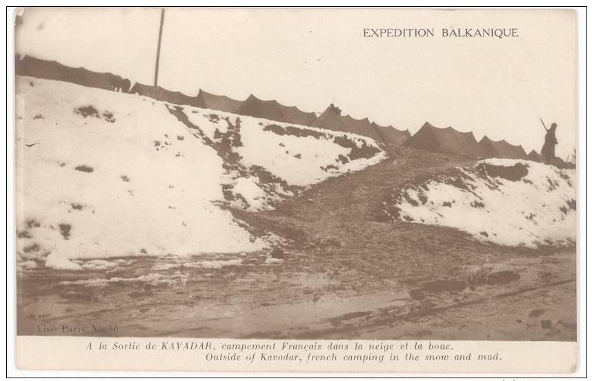 Френски лагер при Кавадарци през Първата световна война